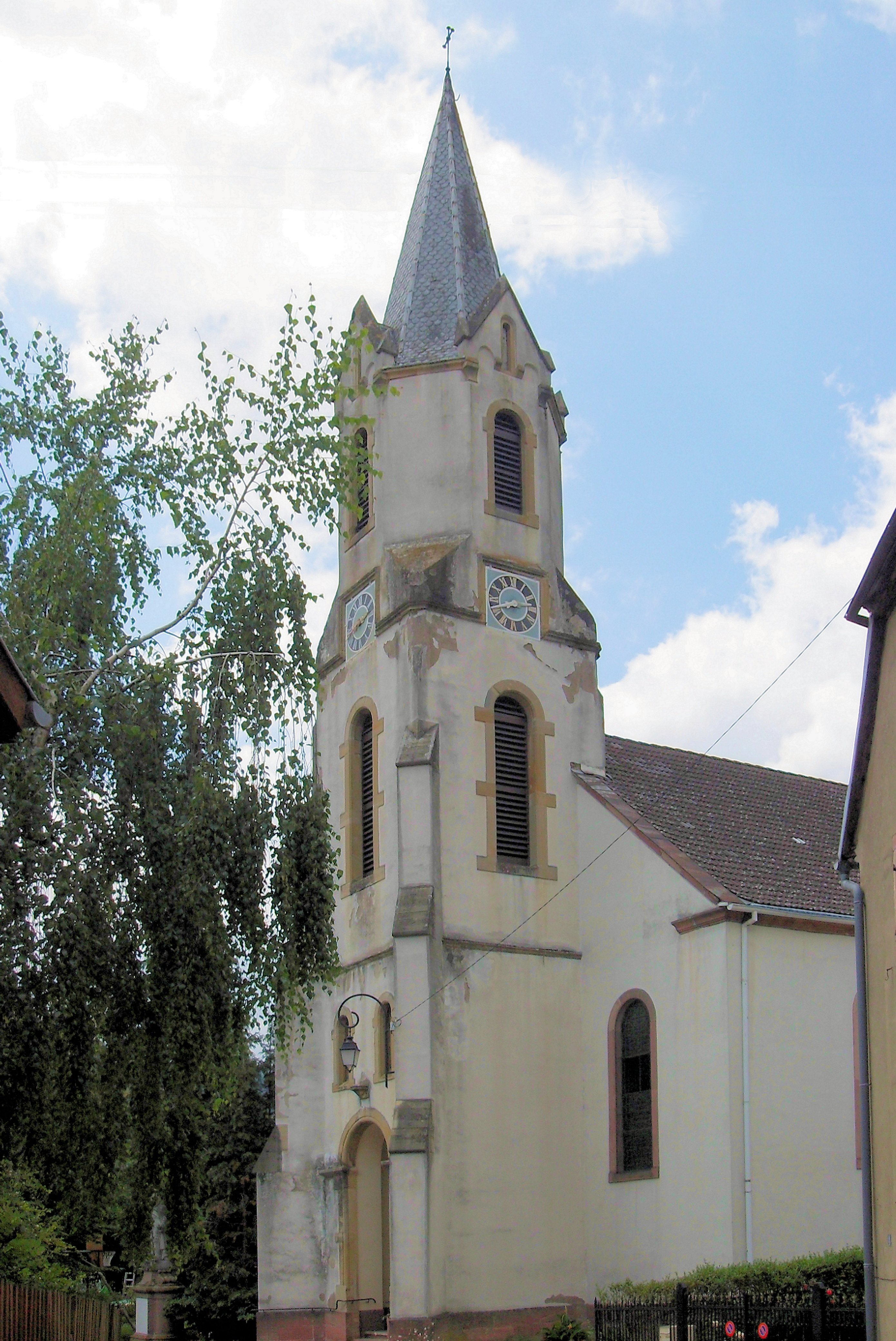 L'église Saint-Michel à Schweighouse, commune Lautenbach